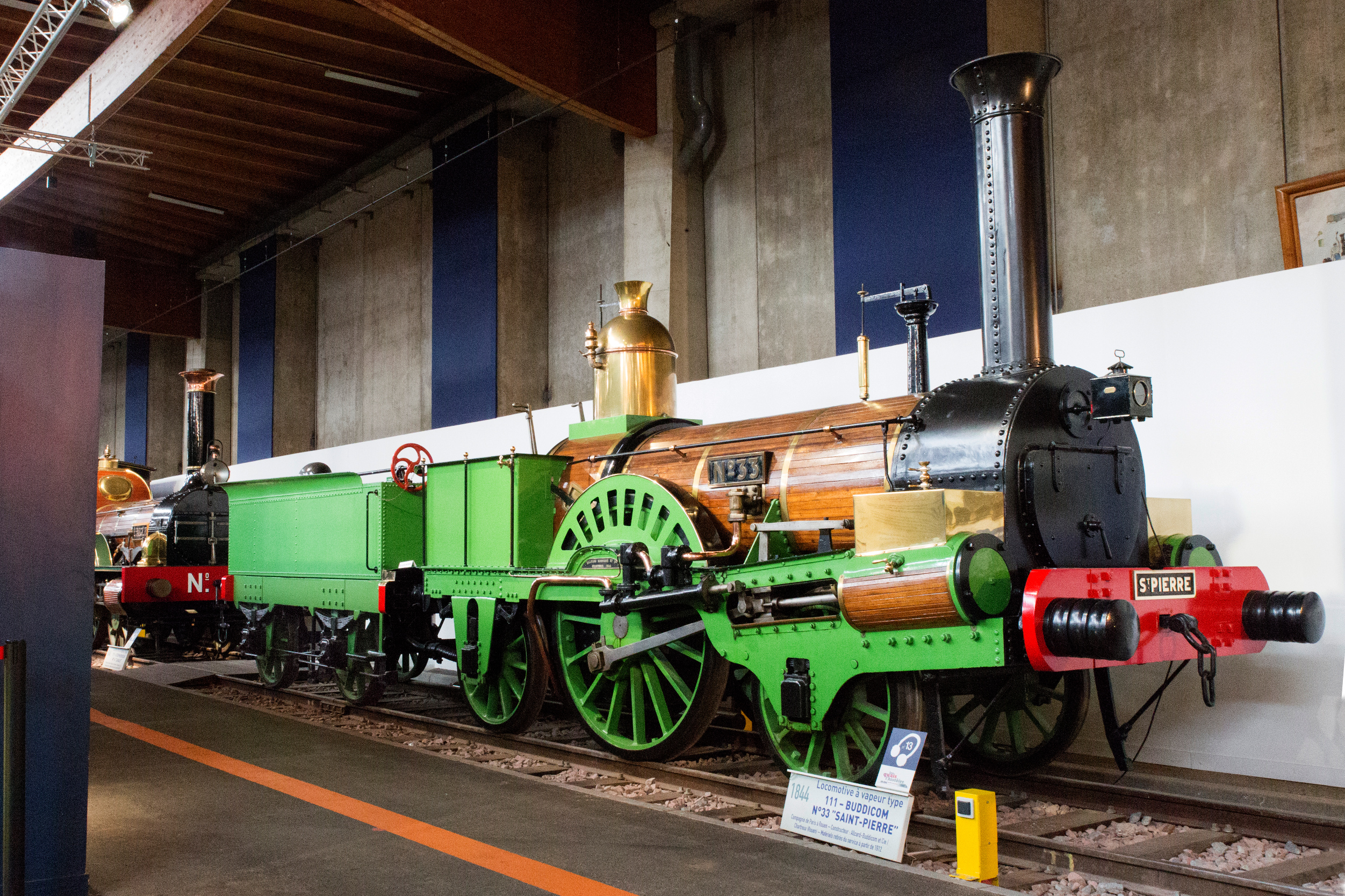 Locomotive 111 Buddicom N° 33 Saint-Pierre